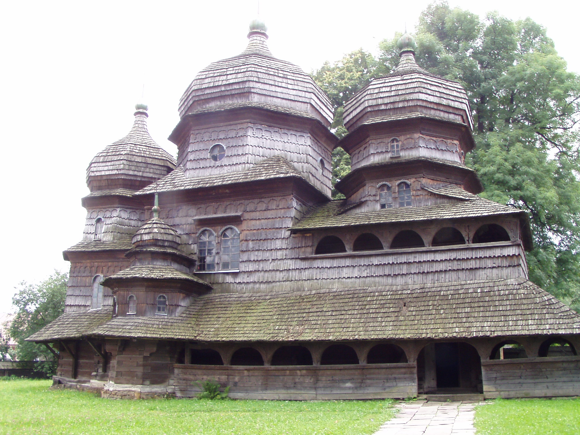 Cerkiew św. Jura w Drohobyczu.